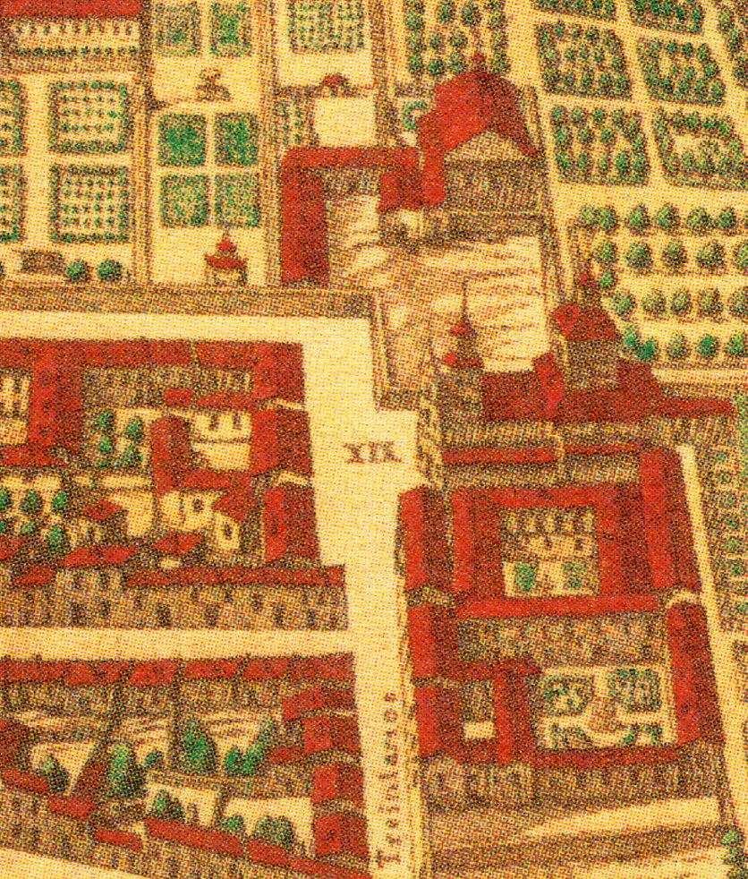 Topografía de la Villa de Madrid descrita por Don Pedro Texeira en 1656, en la cual se demuestran todas las calles al largo y ancho de cada una de ellas, las rinconadas y lo que tuercen las Plazas, fuentes, jardines y huertas con la disposición que tienen las parroquias, Monasterios y Hospitales están señalados sus nombres con letras y números que se hallaran en la tabla y los demás edificios, torres y delanteras de las casas de la parte que mira al Mediodía están sacadas al natural que se podrán tocar las puertas y ventanas de cada una de ellas.